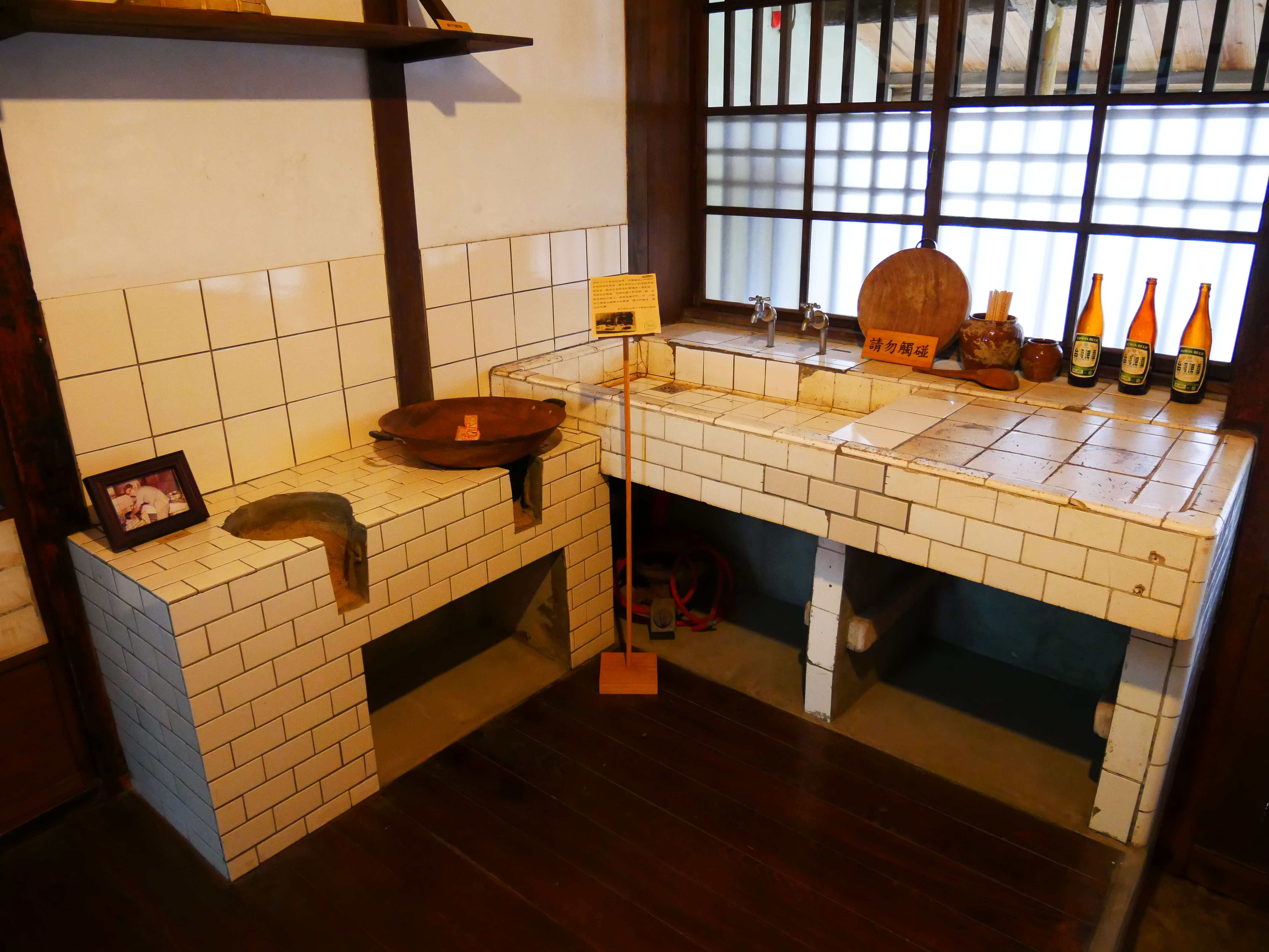 辛志平校長故居台所，新竹市東區東門聯里育賢里